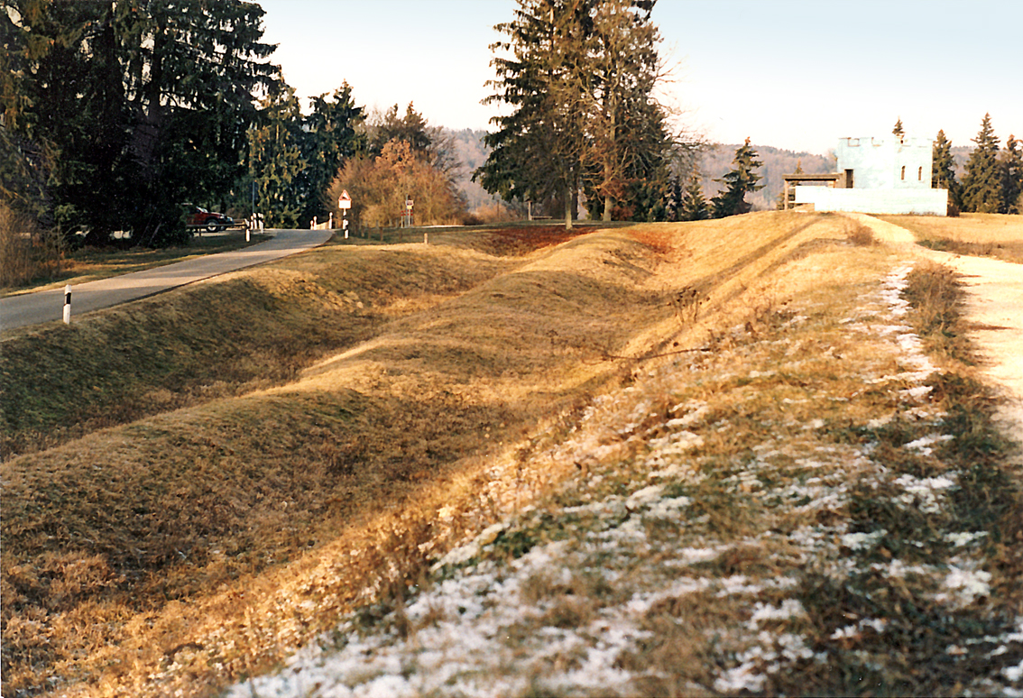 Der in den Felsen geschlagene Doppelspitzgraben des Kastells Pfünz (Castra Vetoniana) läßt sich an einem schneefreien Frühjahrstag besonders gut erkennen. Im Hintergrund wird gerade an der Teilrekonstruktion der Kastellmauer gearbeitet. Zustand im Januar 1993.